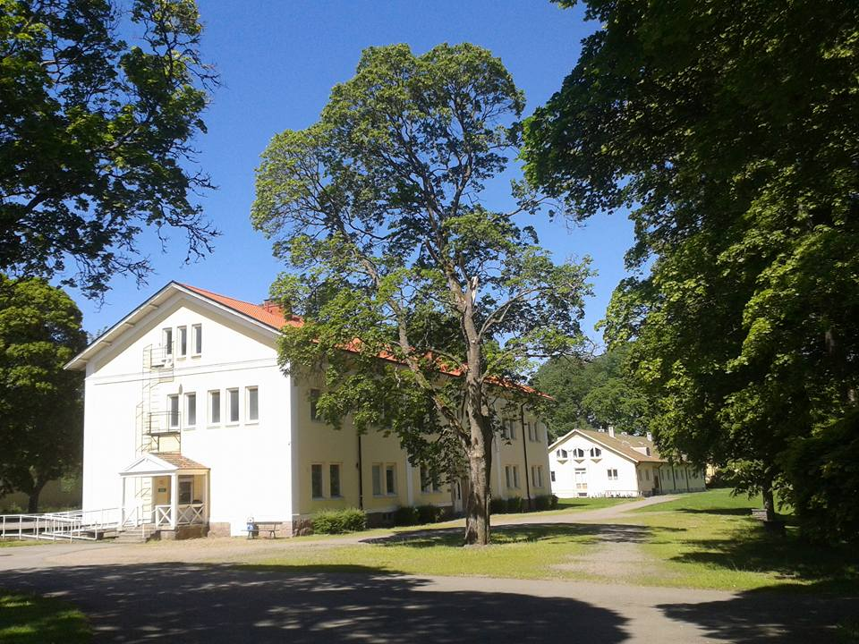 Skolan började sin verksamhet 1873 i Ullervad nära Mariestad, flyttade efter fem år till Stenstorp och år 1923 till Axvall. Tidigare hette skolan Skaraborgs läns folkhögskola och hade Skaraborgs läns landsting som huvudman ända till 1982. Den nuvarande huvudmannen är Stiftelsen för Axevalla folkhögskola, vars stiftare är Sverigefinska Riksförbundet och därför har finska språket ett stort utrymme på skola, vilket bland annat syns i skolområdet som är skyltat på svenska och finska.